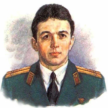 Tenente dei Vigili del fuoco Viktor Mykolajovych Kіbenok, Eroe dell'Unione Sovietica